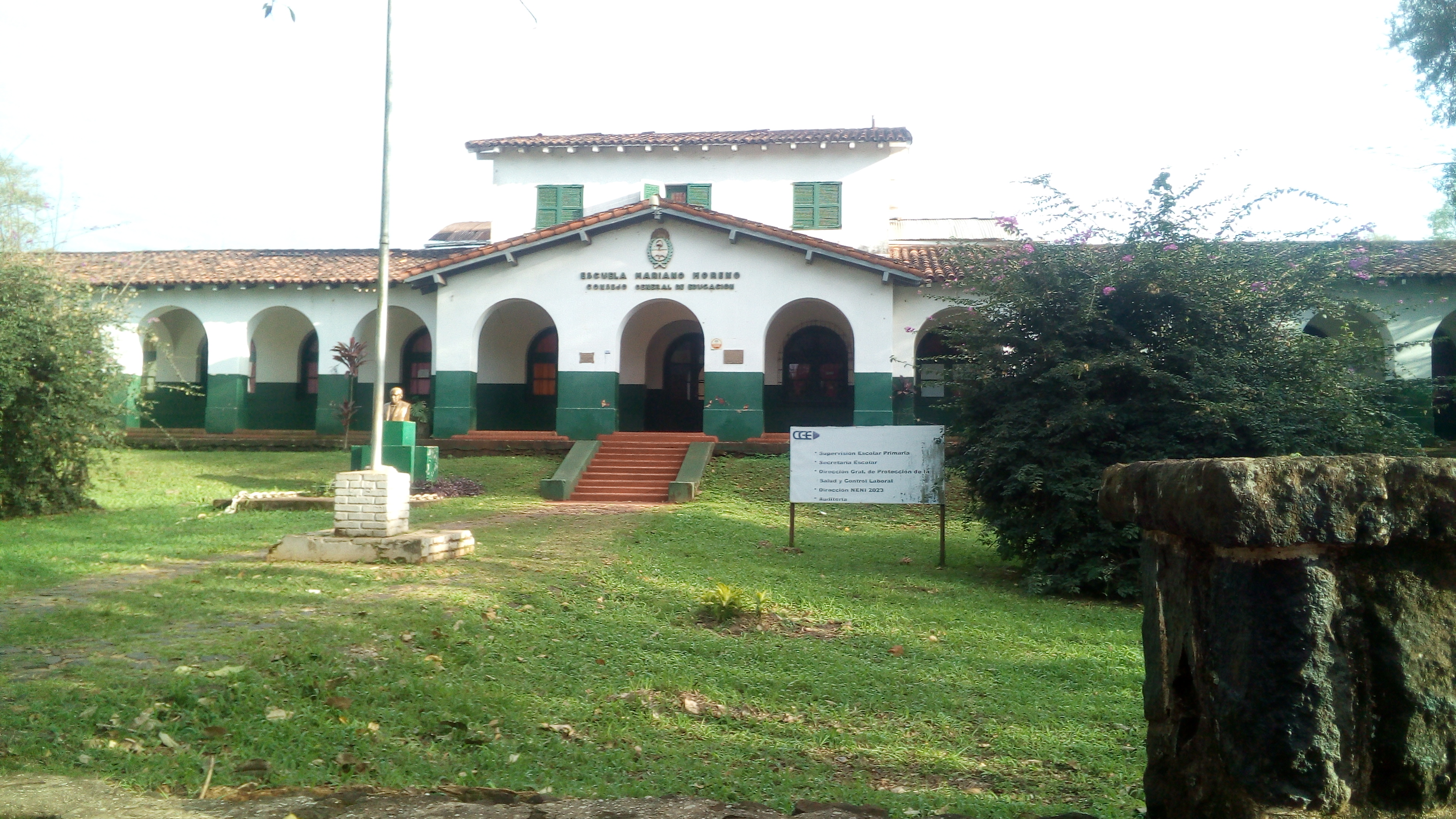 La escuela Mariano Moreno fue la primera que se construyo en Puerto Iguazú, se fundó en 1935, con la administración de Parques Nacionales, que decidio crear un establecimiento educativo que estudiaran los hijos de personal. En su comienzo se denominó Escuela Nacional N°235 en 1942 se inauguró el edificio actual con el nombre de escuela N°615 Mariano Moreno. En 1949 egresaron los primeros 9 alumnos de sexto año. Se trata de un edificio construido por arquitecto Alejandro Bustillo que cuenta con planta baja y primer piso, en el año 2009 fue declarado patrimonio histórico y cultural de puerto Iguazú, se encuentra sobre la avenida San Martín.Escuela de frontera N°615 "Mariano Moreno"